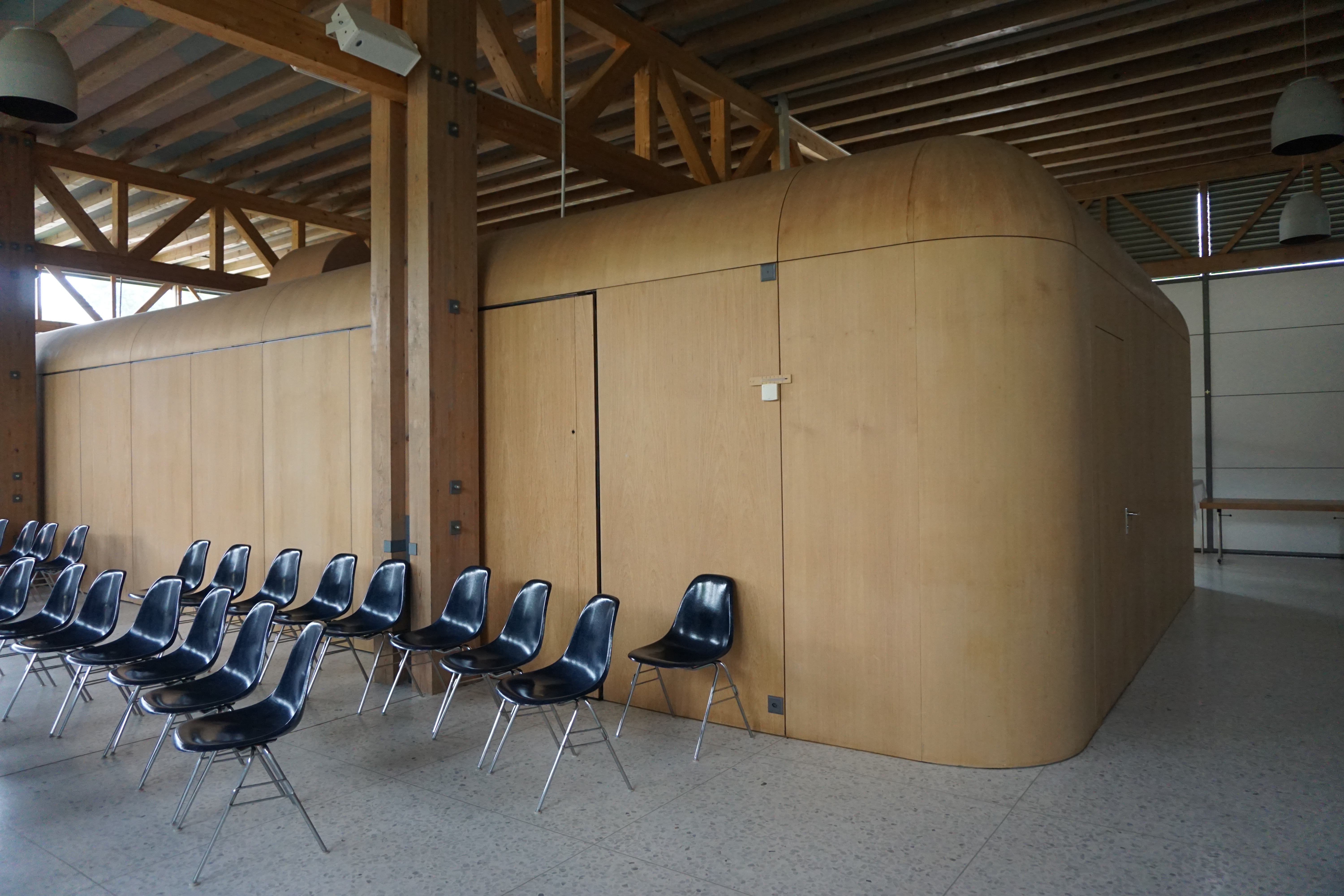 Kirche St. Martin, Lengnau. Innenraum, Verkleidung der Nebenräume.